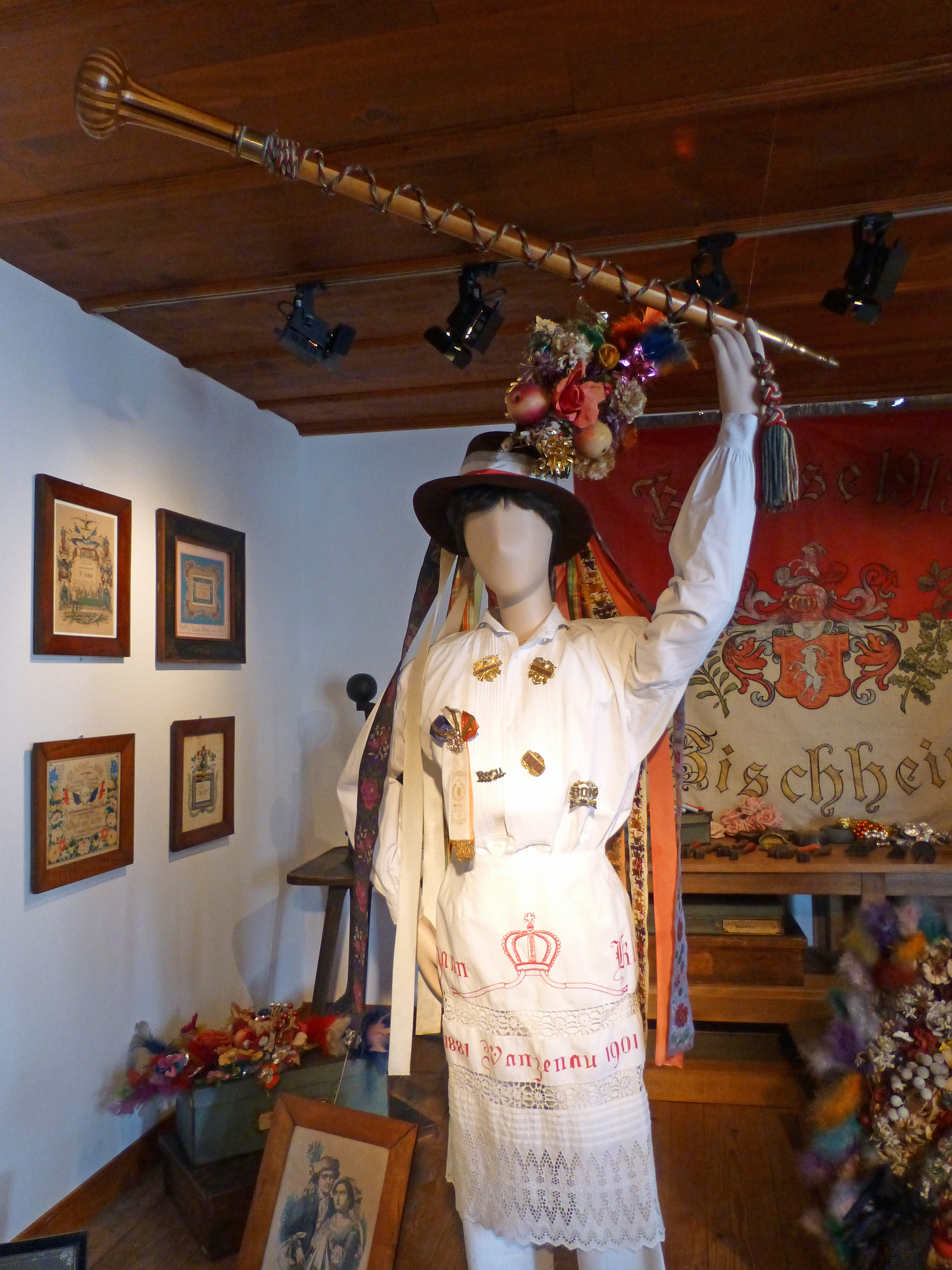 Costume de conscrit au Musée alsacien de Strasbourg.